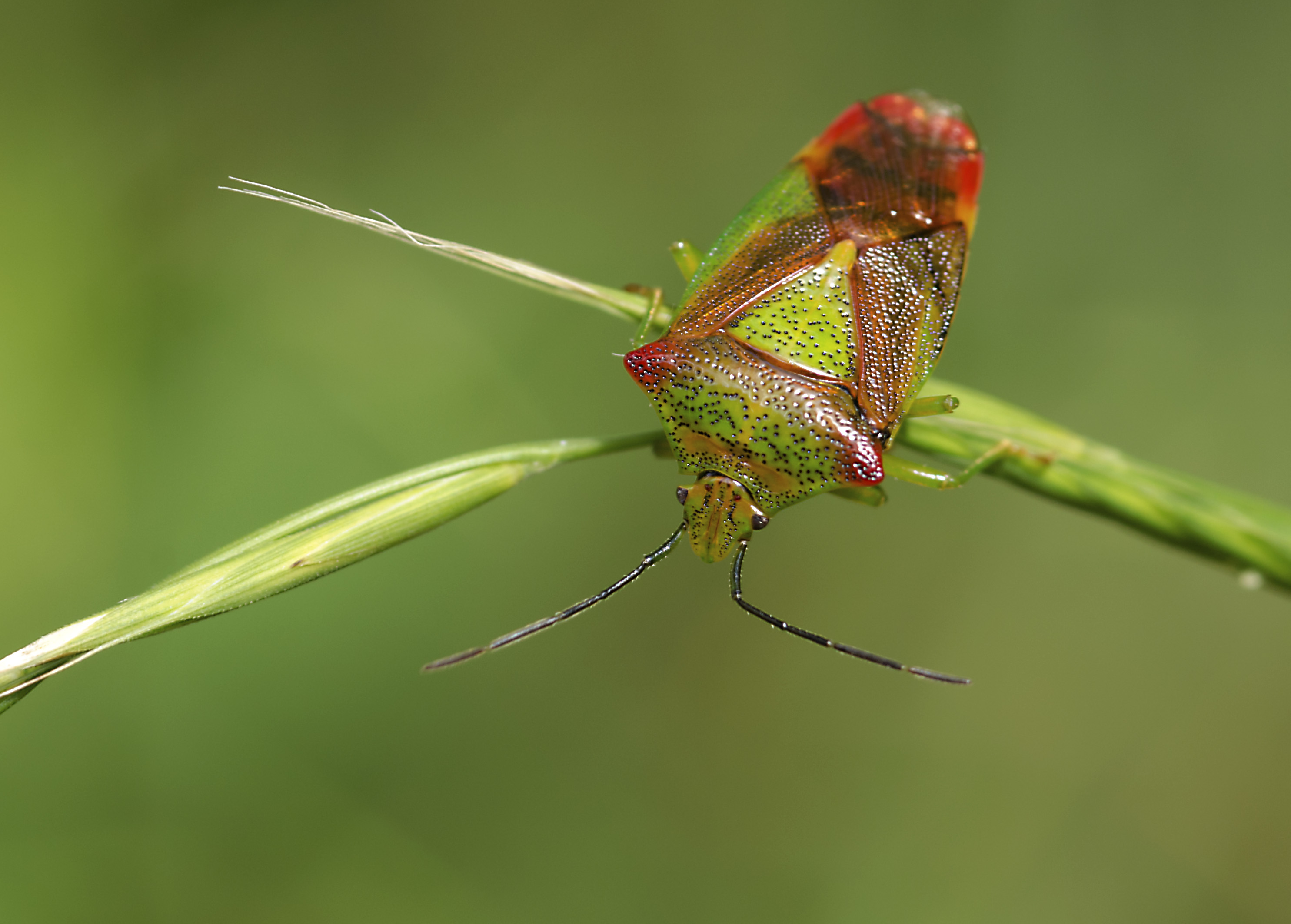 Wipfel-Stachelwanze (Acanthosoma haemorrhoidale), aufgenommen im Wald bei Stuttgart